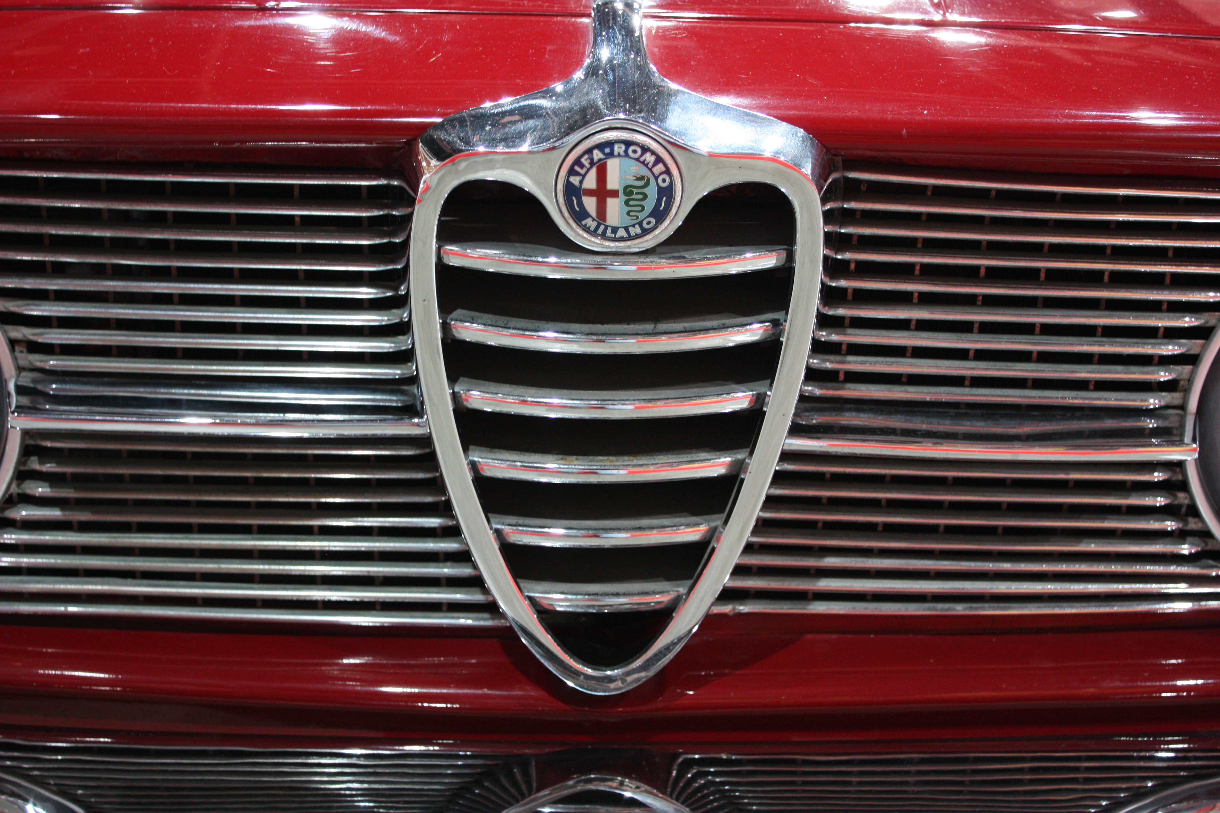 Alfa Romeo Grille